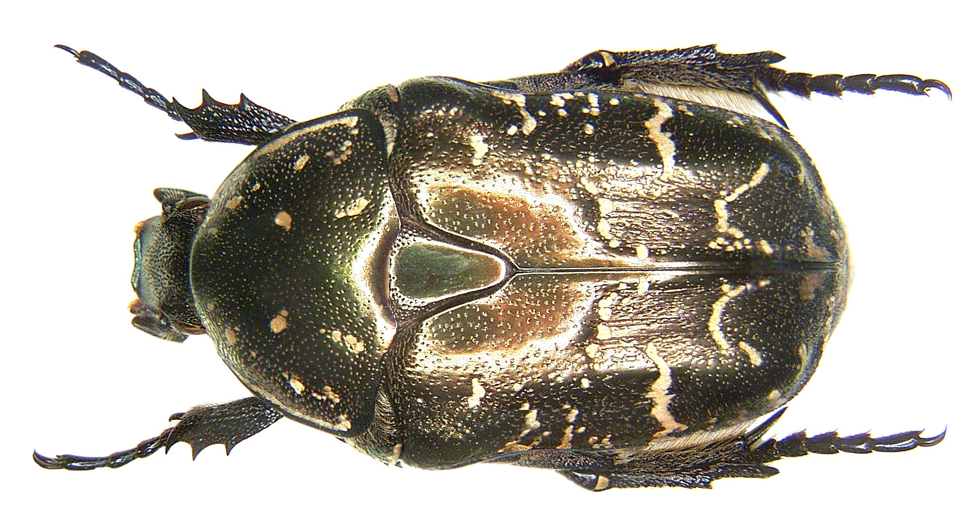 Familie: Scarabaeidae Grösse: 17-23,5 mm Fundort: Türkei, Prov. Antalya, Köprülü leg. A.Skale, 2004; det. Rößner Foto: U.Schmidt, 2007